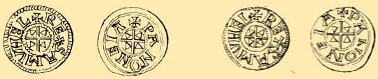 Aba samuel- denáry